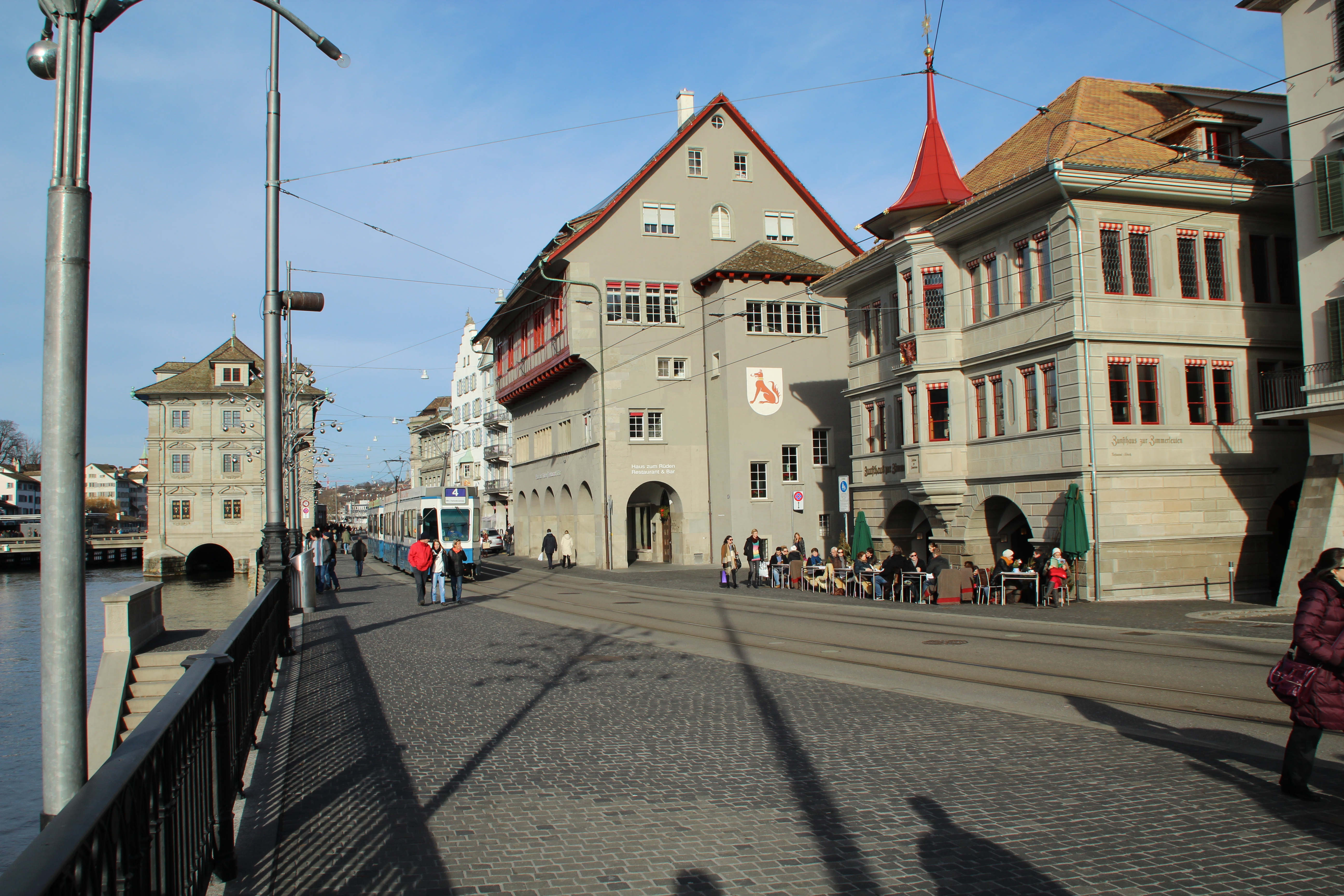 Limmatquai Zürich nach Norden. In der Mitte Zunfthaus Rüden, links das Rathaus